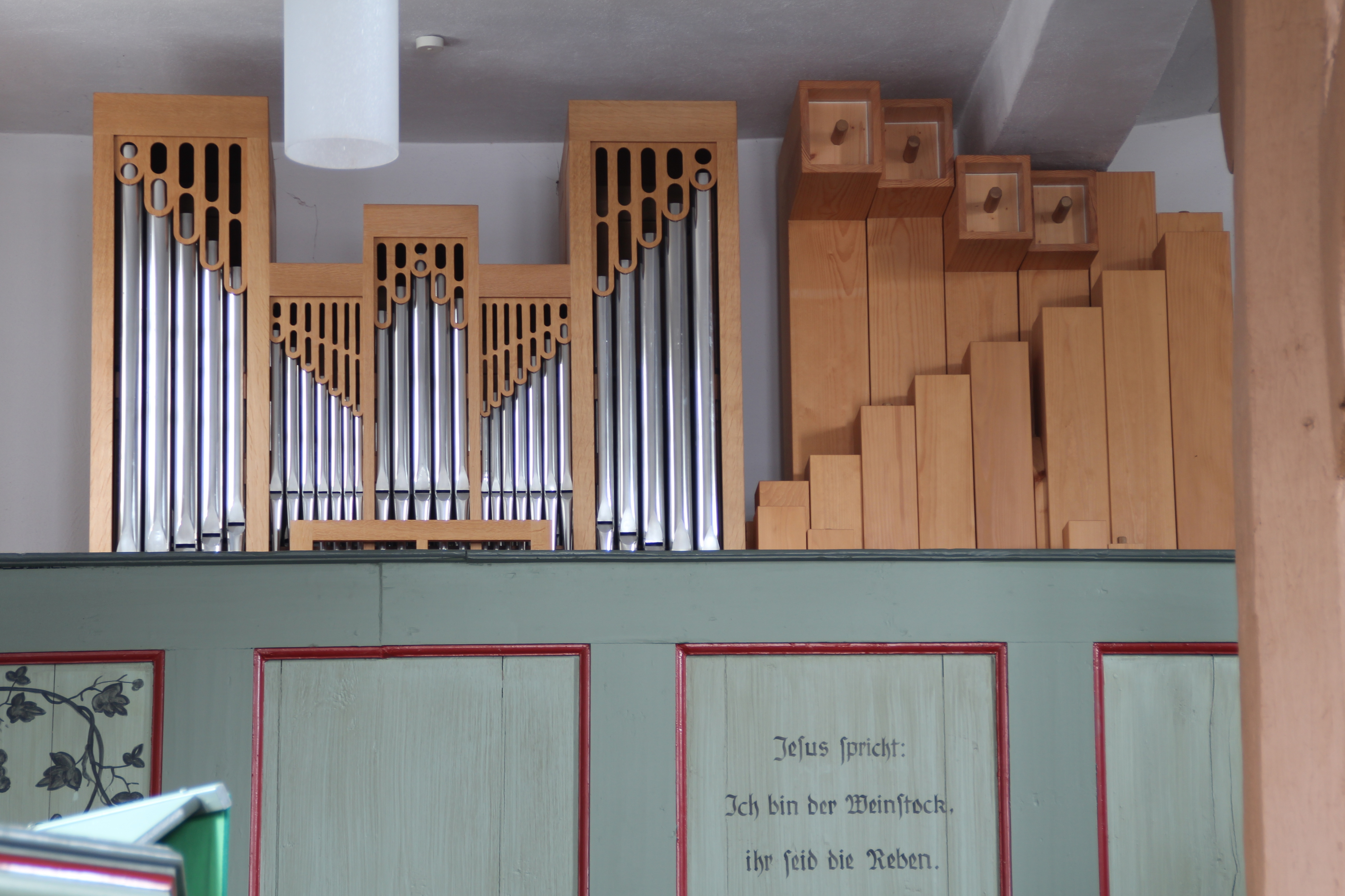 Kirche Reinhardshain, Grünberg, Gießen, Hessen, Deutschland